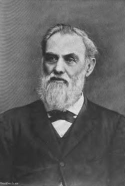 Photo - Portrait des Stephen Heard Darden (1816-1902). Ein US-amerikanischer Farmer, Politiker und Offizier in der Südstaatenarmee.